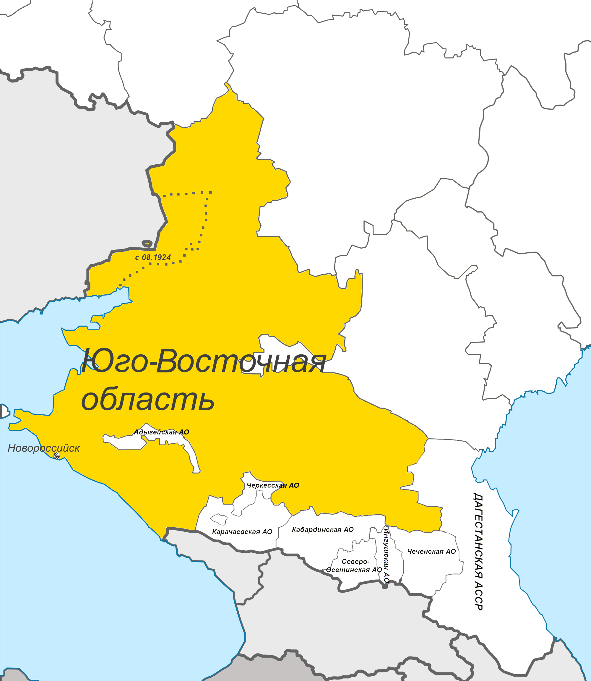 Карта Юго--Восточной области РСФСР, существовавшей в течении 1924г и далее реформированной в Северо-Кавказский край.